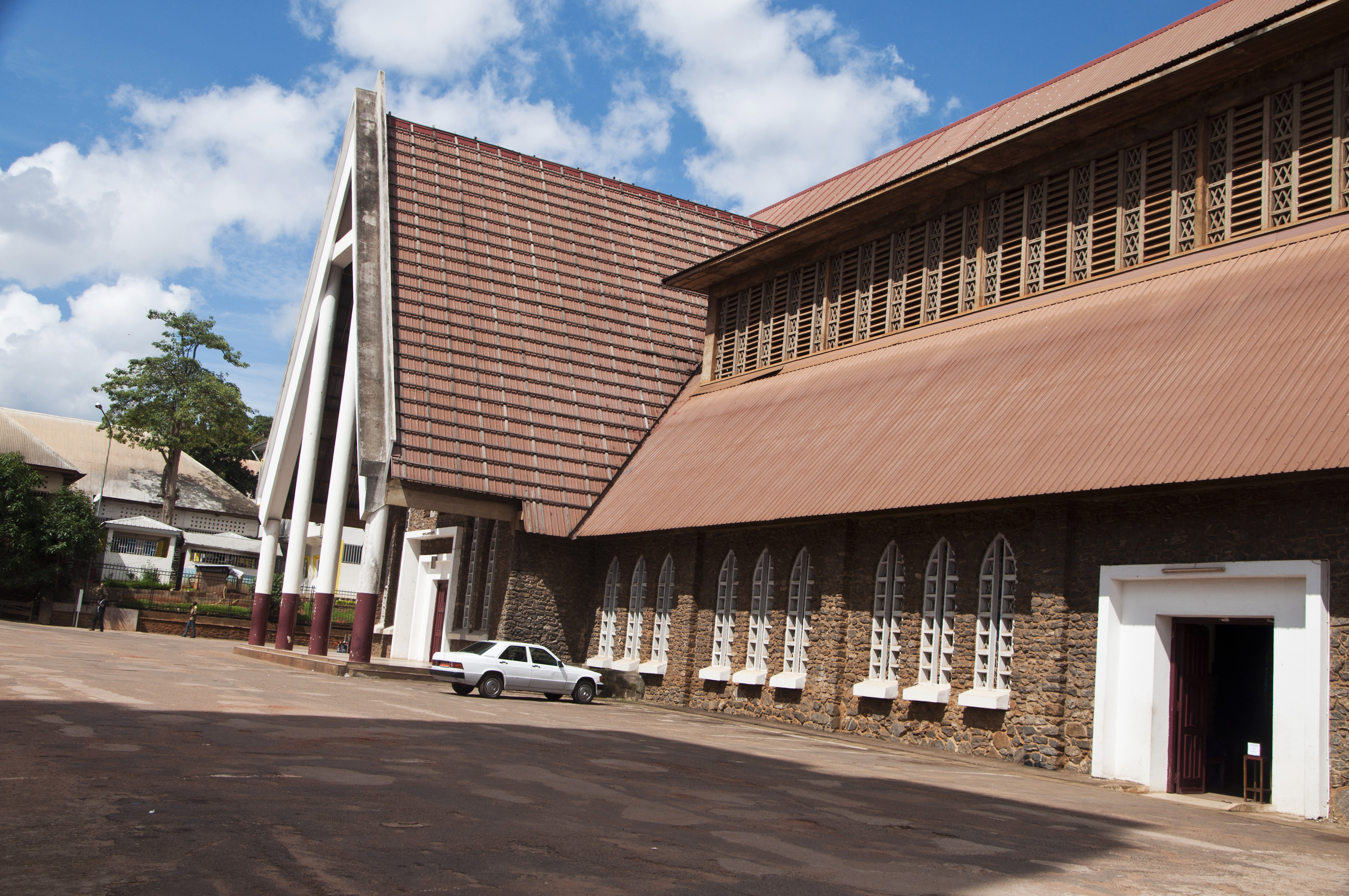 Cathédrale notre dame de victoire de Yaoundé